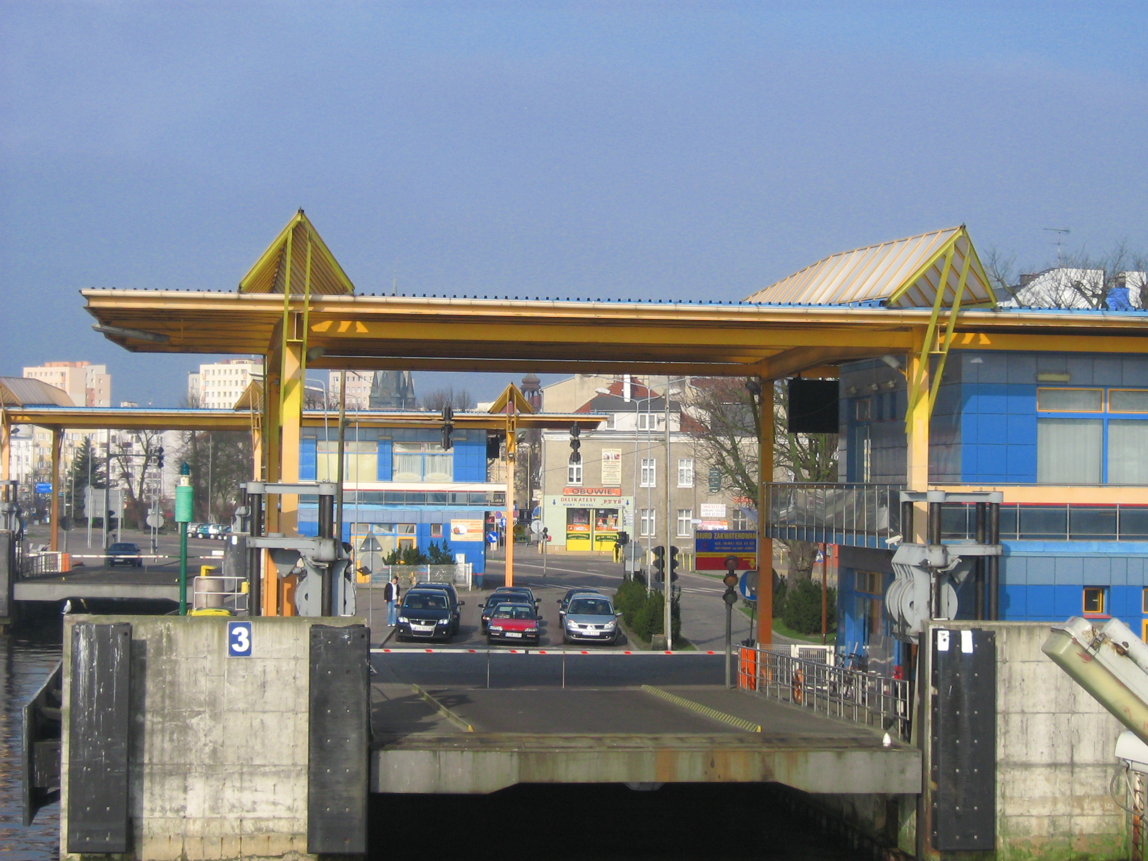 Przeprawa promowa Bieliki. Widoczna przeprawa na Uznamie.